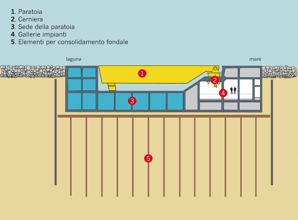 Sezione paratoia con evidenziata la cerniera